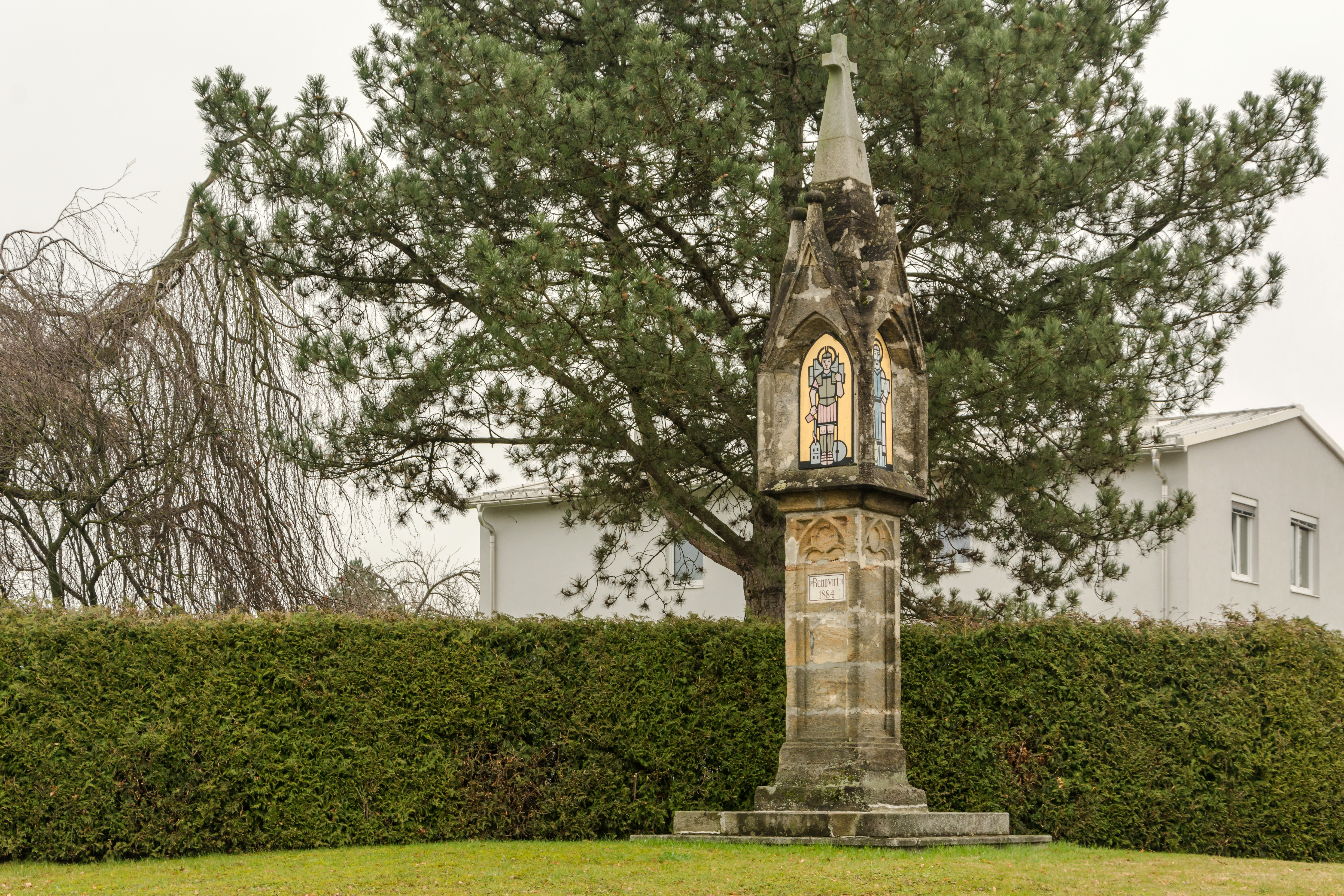 Figurenbildstock